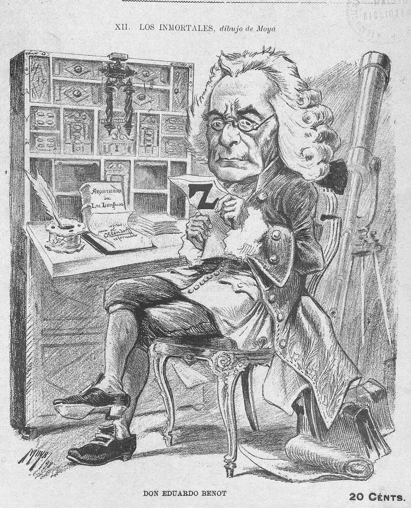 Don Eduardo Benot.